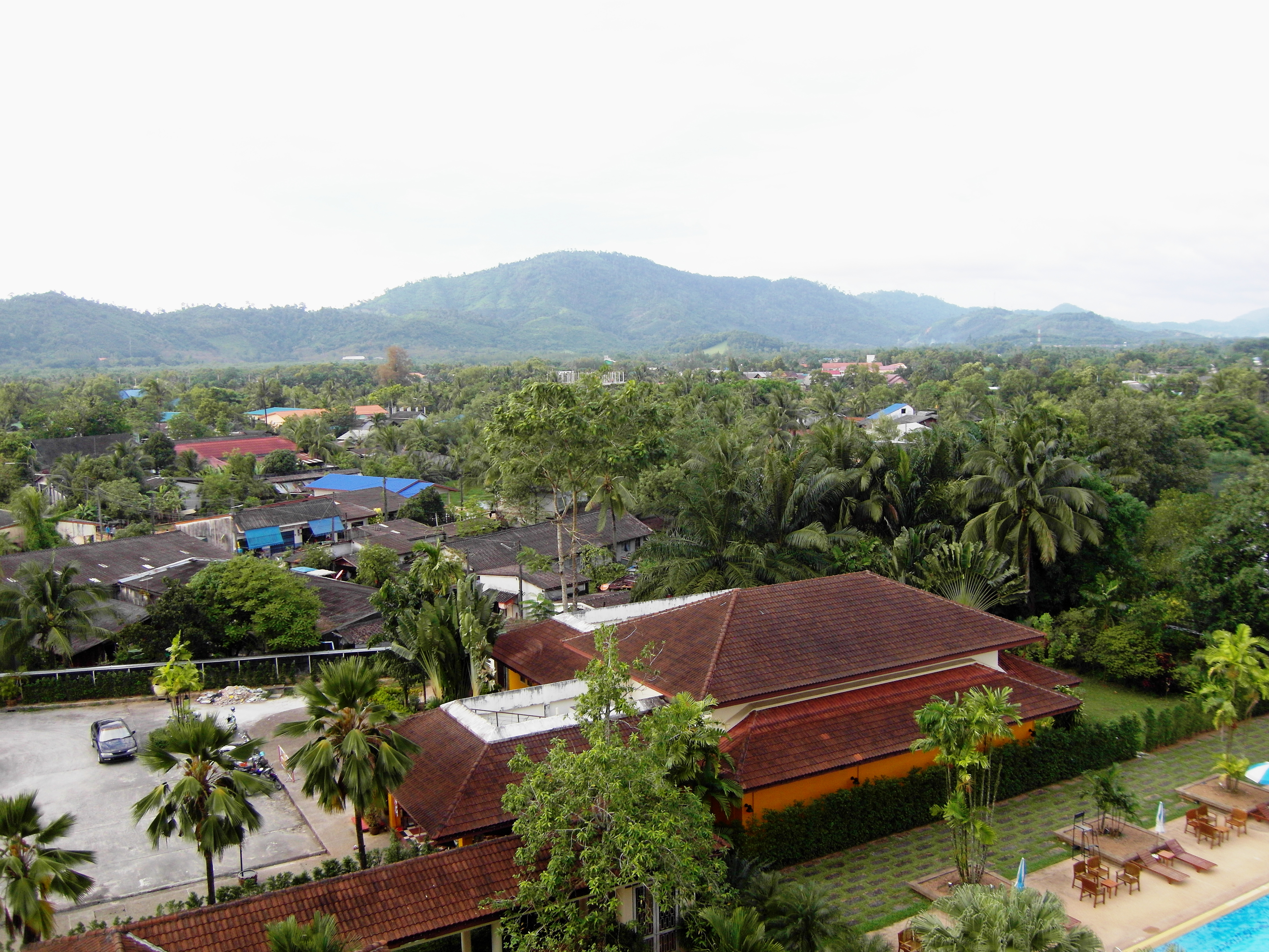 Bang Non, Mueang Ranong District, Ranong 85000, Thailand